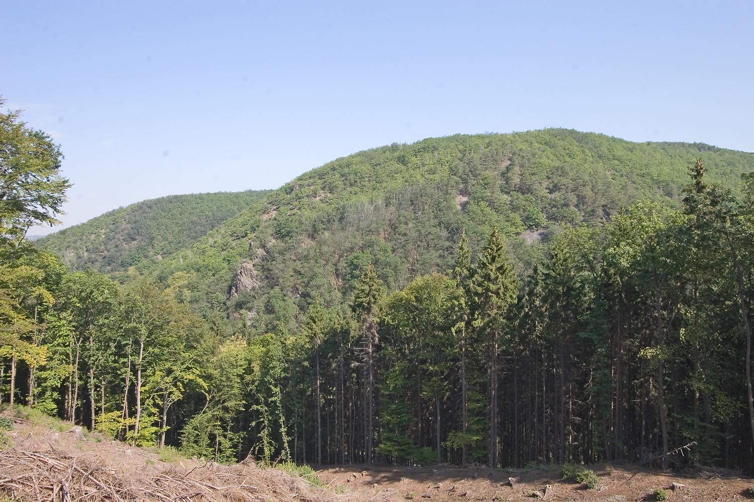 Keltské oppidum Závist u Zbraslavi - pohled na protější vrch s opevněním Šance